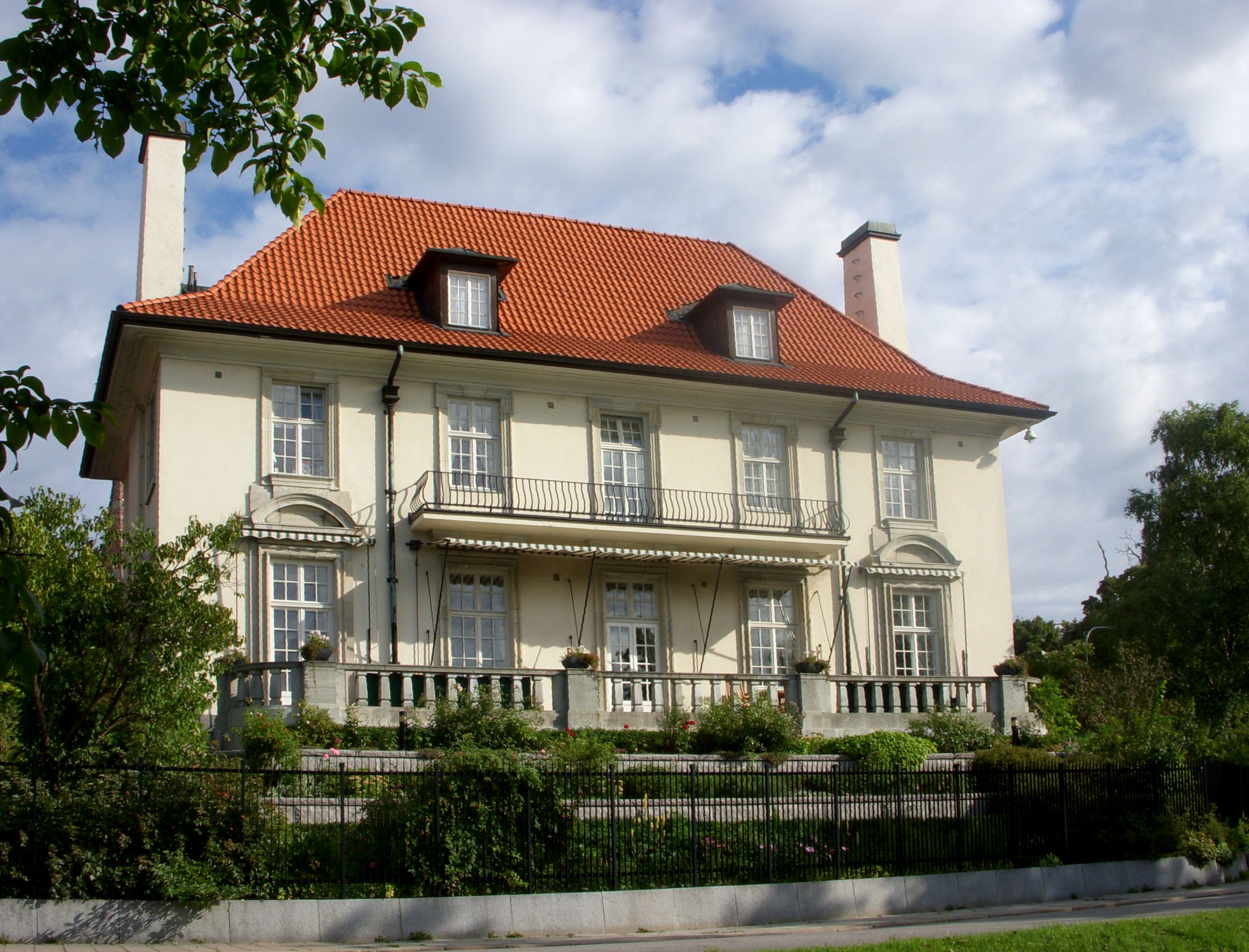 Diplomatstaden i Stockholm, Kv. Diplomaten nr. 1